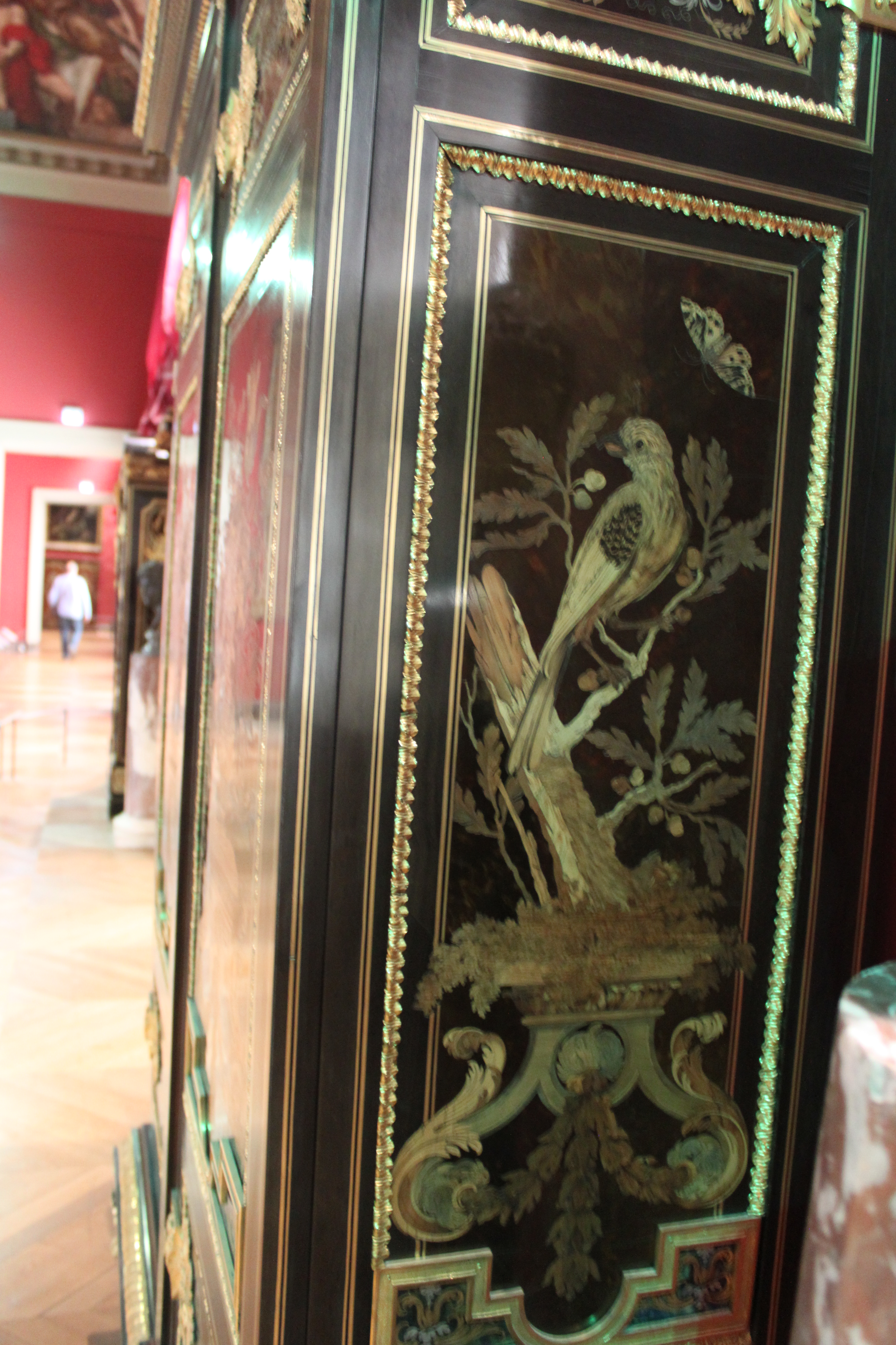 Armoire aux perroquets - vue de côté - 1680-1700 - Louvre - OA 5516